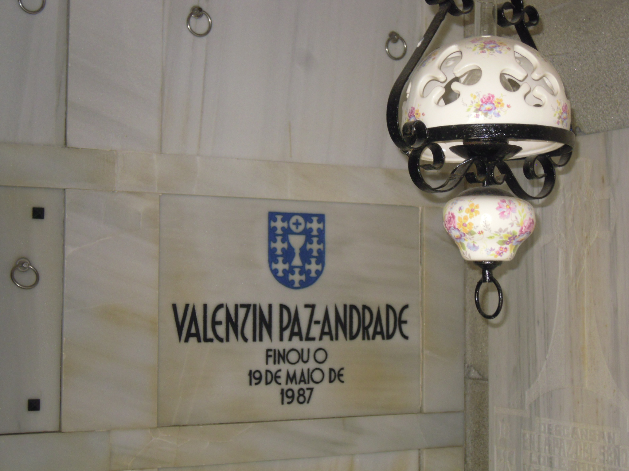 Lápida de Valentín Paz Andrade no camposanto Lérez (Pontevedra).